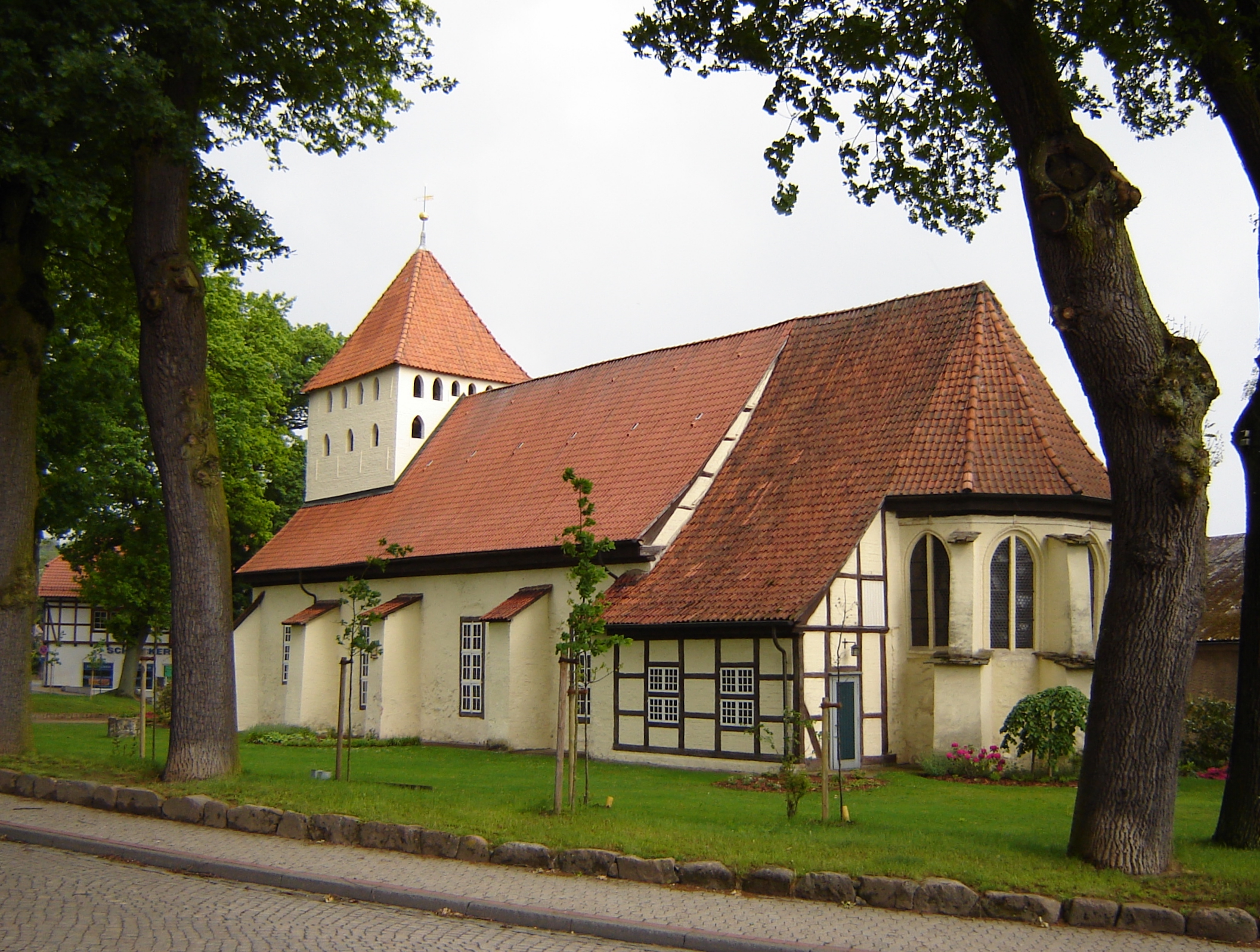 Kirche in Hankensbüttel (Niedersachsen)